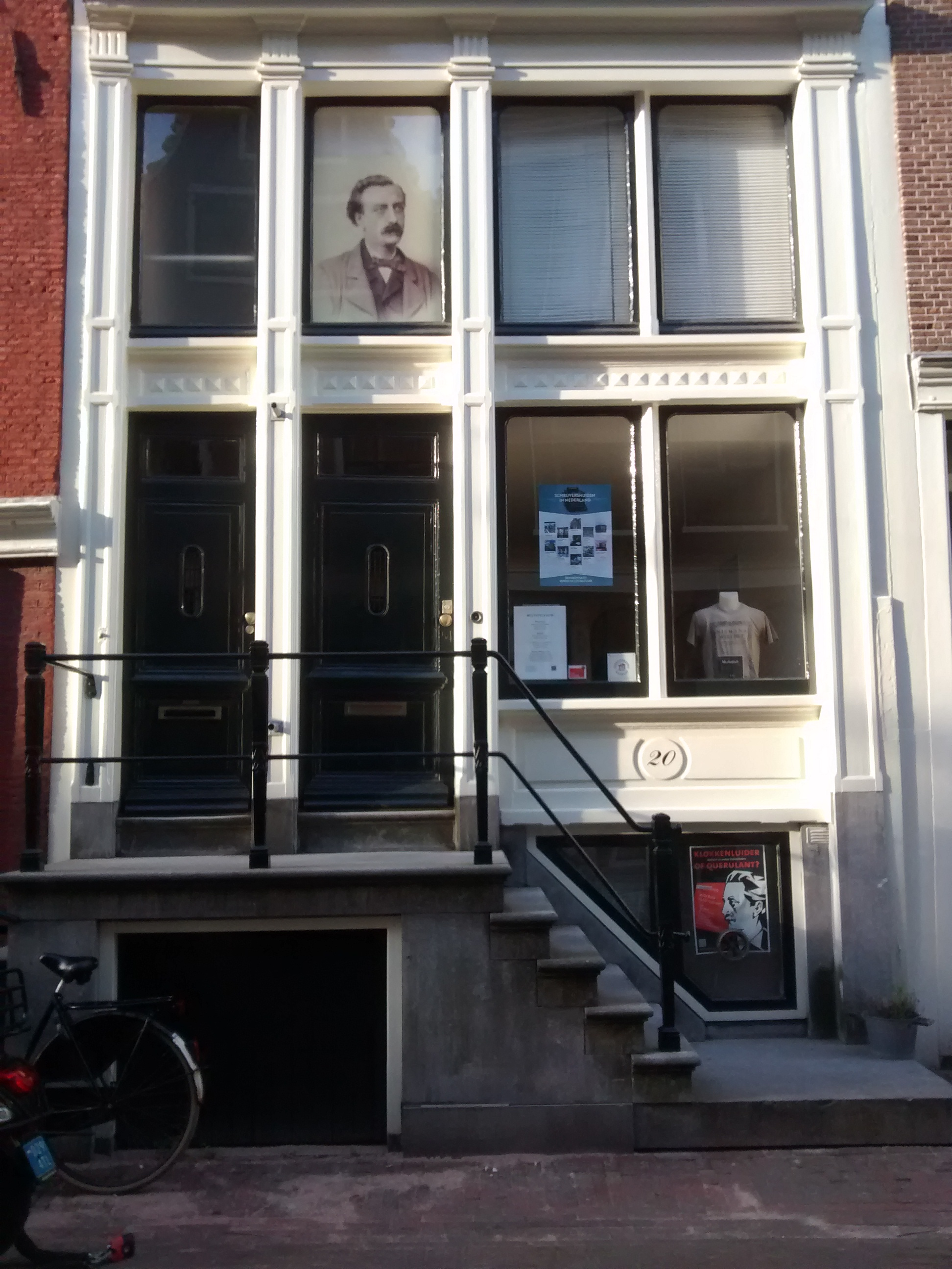 Multatuli Museum in Amsterdam.